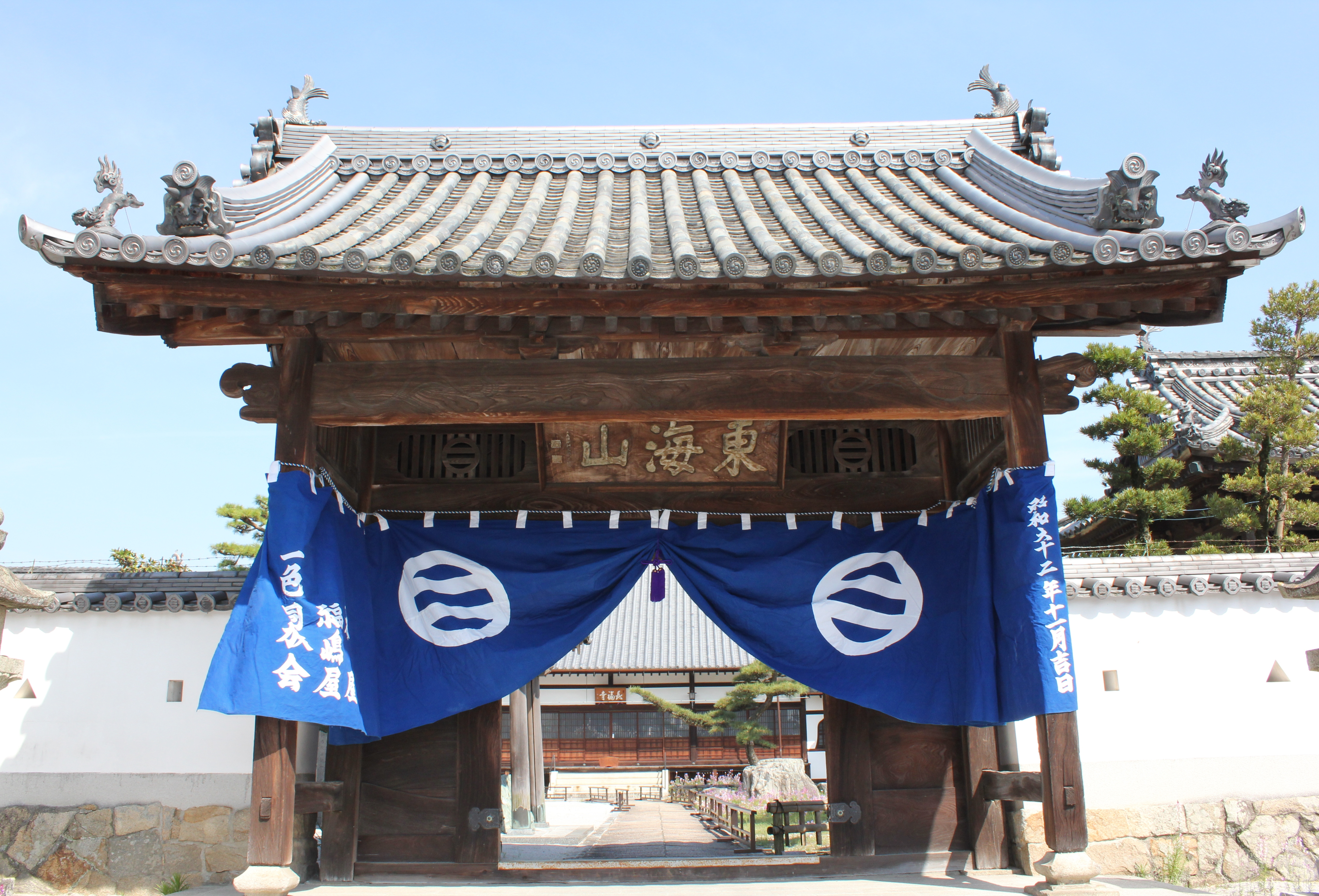 一色右馬三郎重之の菩提寺である長福寺の山門